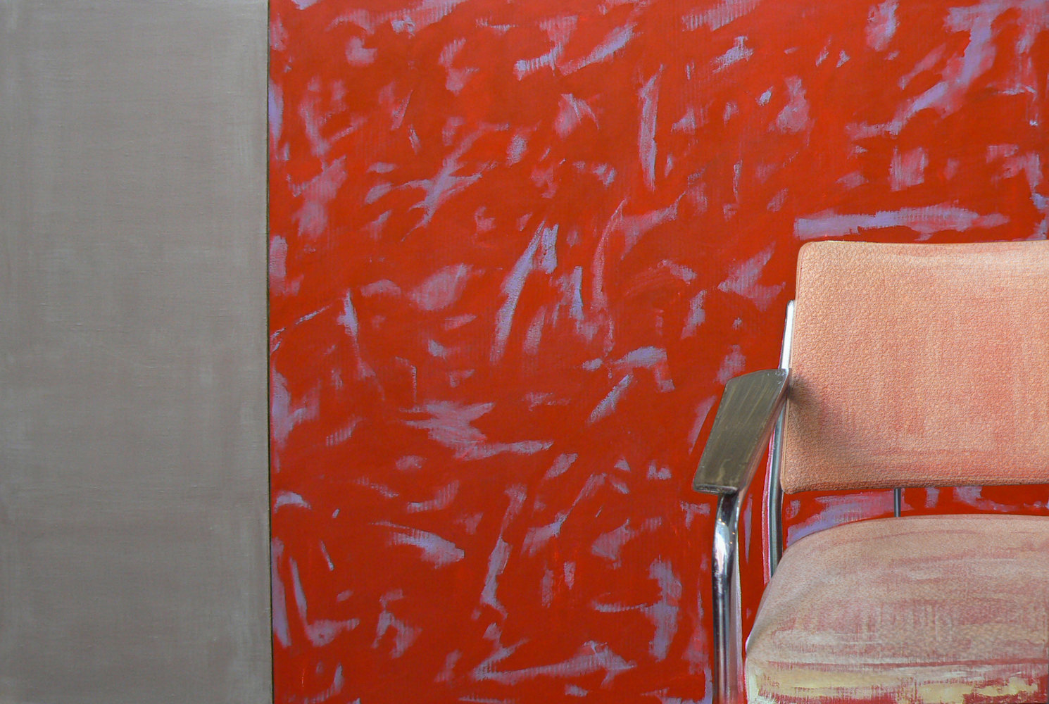 Martin Velíšek, Křesílko, 2015, olej na plátně, 105 x 157 cm